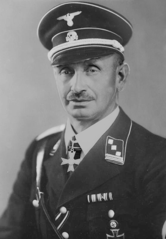 Ernst Ritter Bauer Ernst Ritter, Ritterkreuzträger des Kriegsverdienstkreuzes. [Verliehen am 4.10.1942] Phot. Heinscher 13.10.42 [Porträt Ernst Ritter in der Uniform eines SS-Hauptsturmführers] Abgebildete Personen: Ritter, Ernst: Bauer, Bauernführer, Ritterkreuz (RK) zum Kriegsverdienstkreuz (KVK), Deutschland